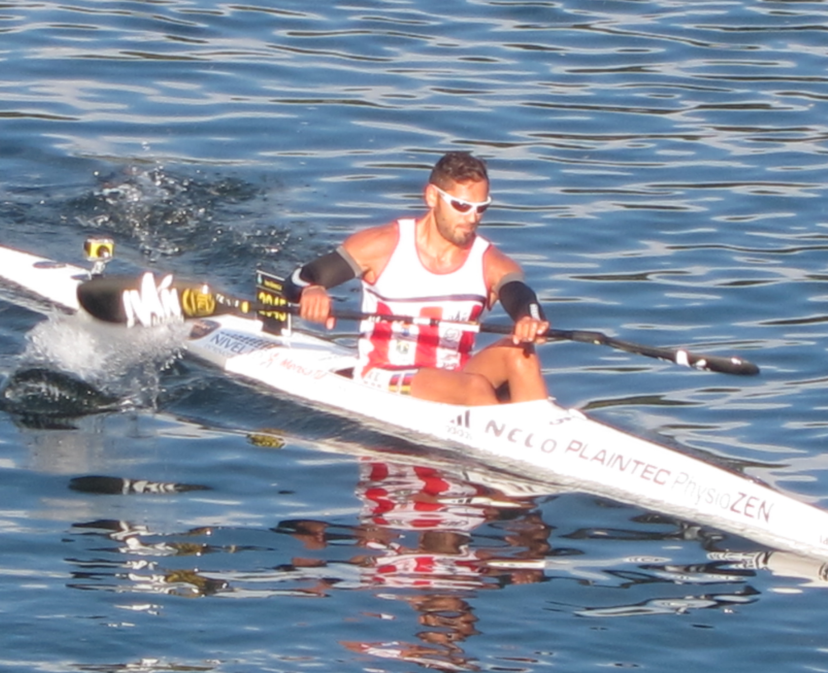 Iván Alonso Lage en el Descenso del Miño de Tuy 2014